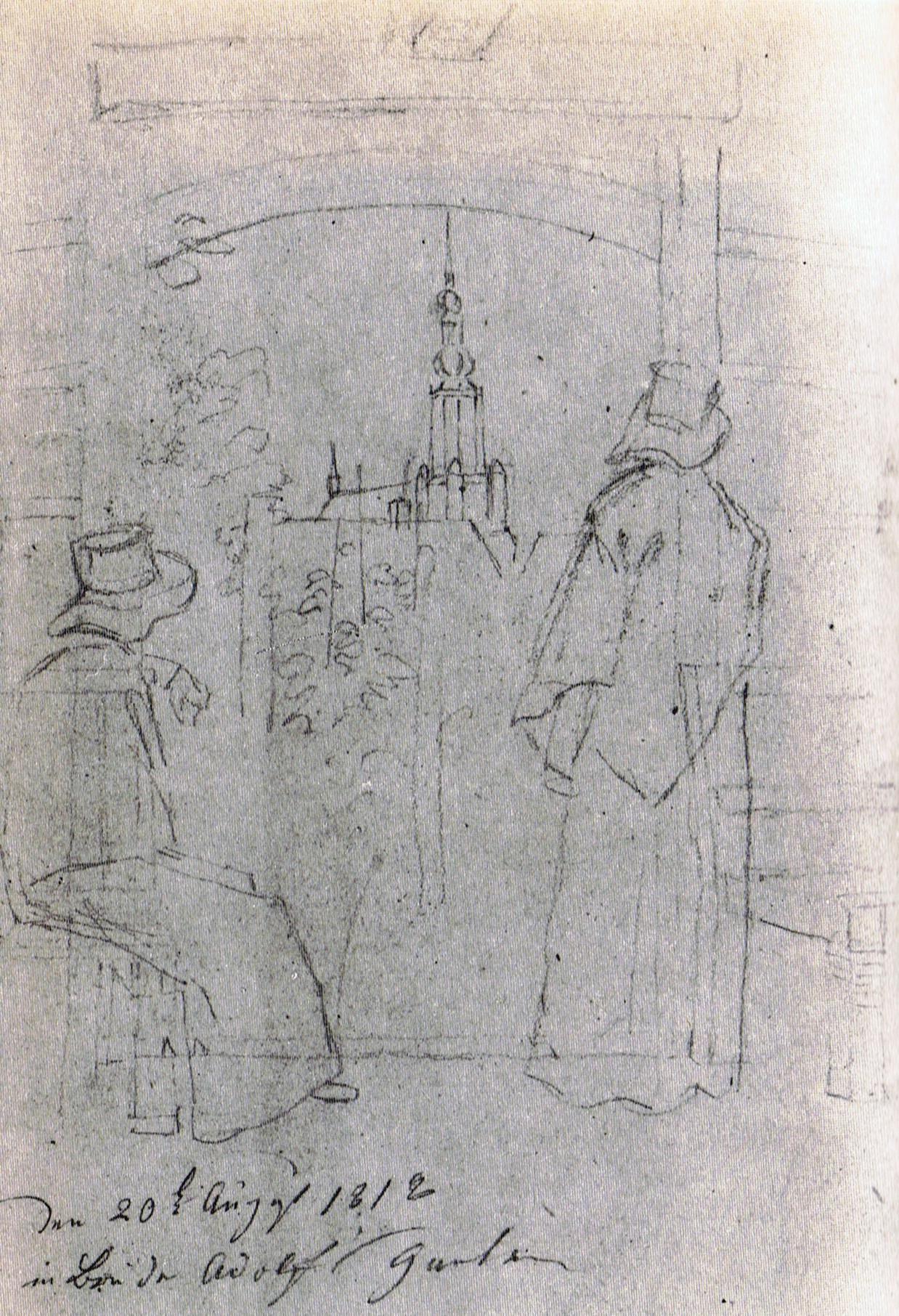 Blick aus einer Laube auf die Nikolaikirche in Greifswald. 20. August 1818, Bleistift, 19,7 x 12,4 cm